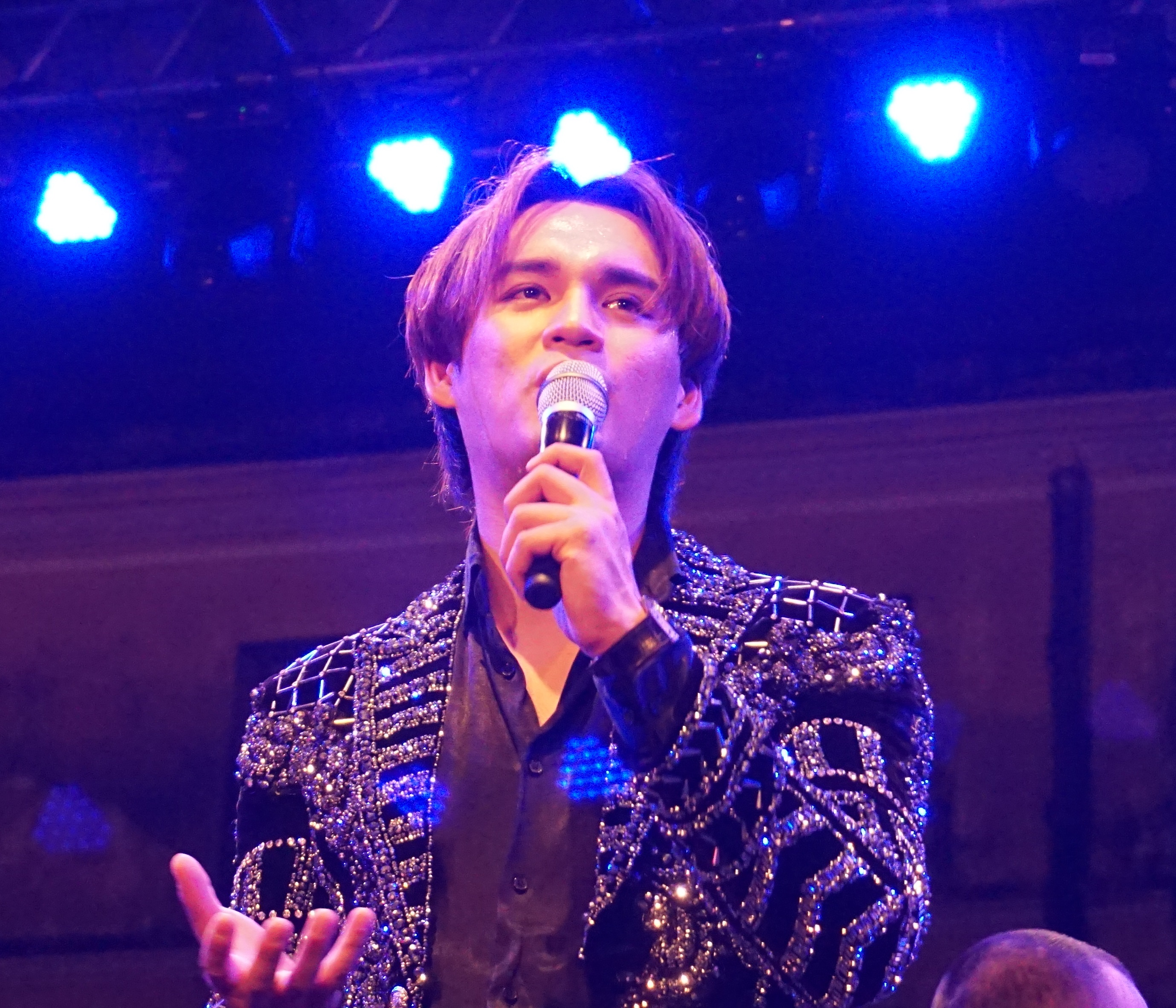 Ảnh chụp Nguyễn Trần Trung Quân trình diễn trong concert "Mặt trời Phương Đông", Festival Huế 2018